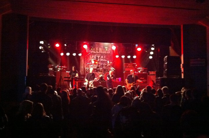 Inmoria live at BMR Festival 2011